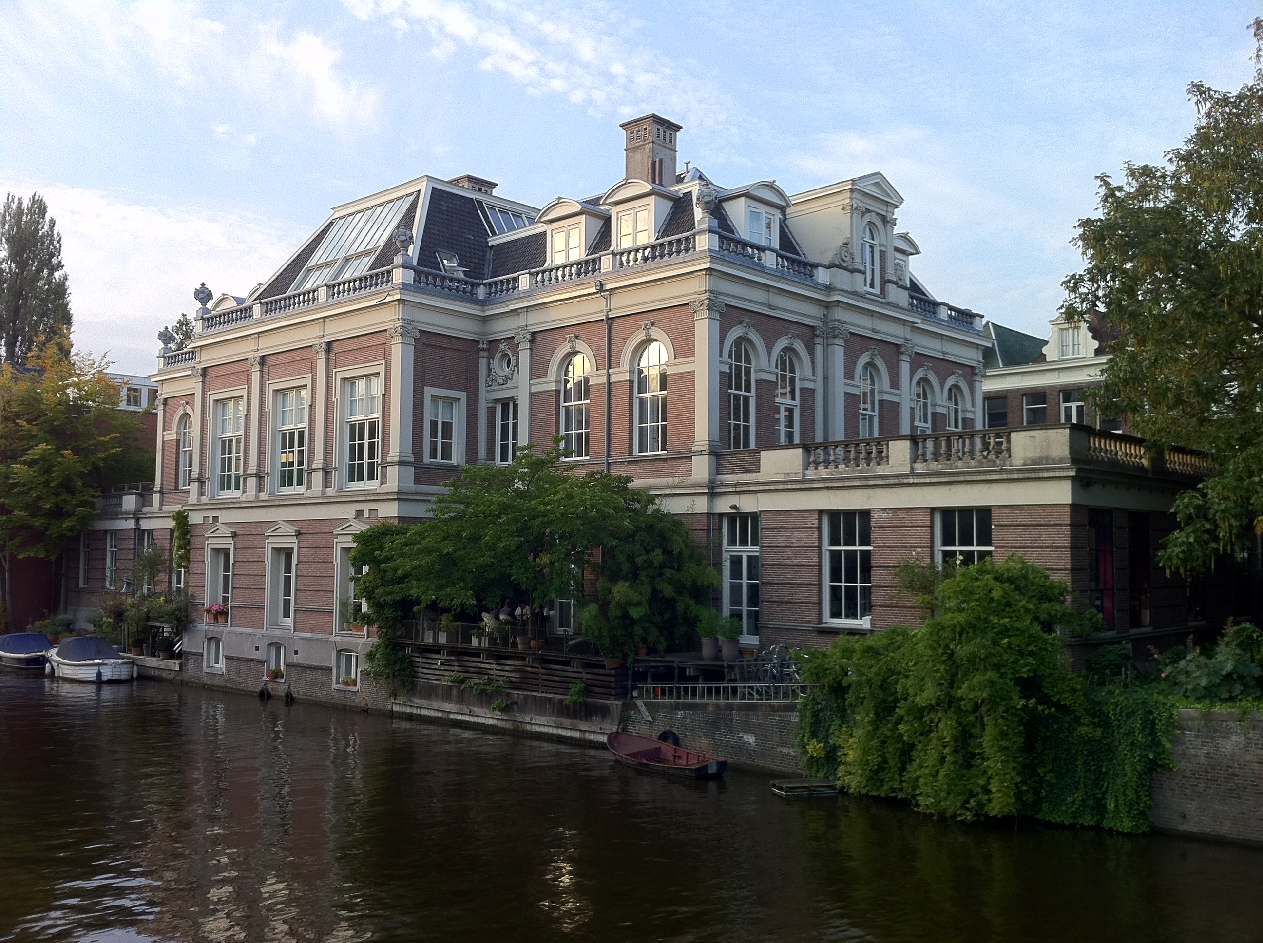 Amsterdam - Laboratorium Universiteit van Amsterdam UvA, Plantage Muidergracht